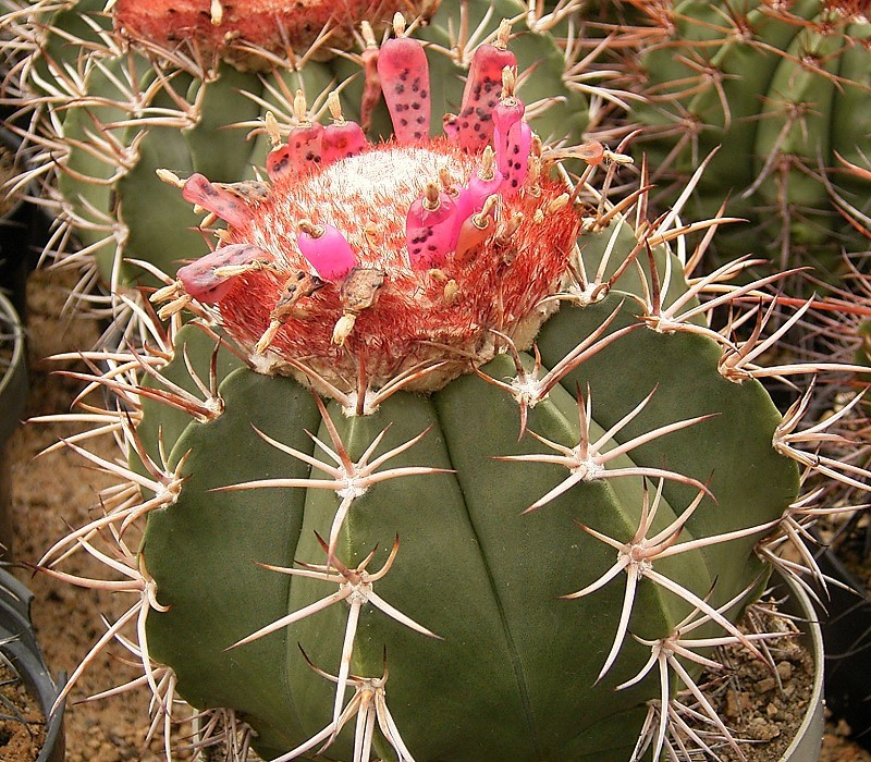 Melocactus curvispinus